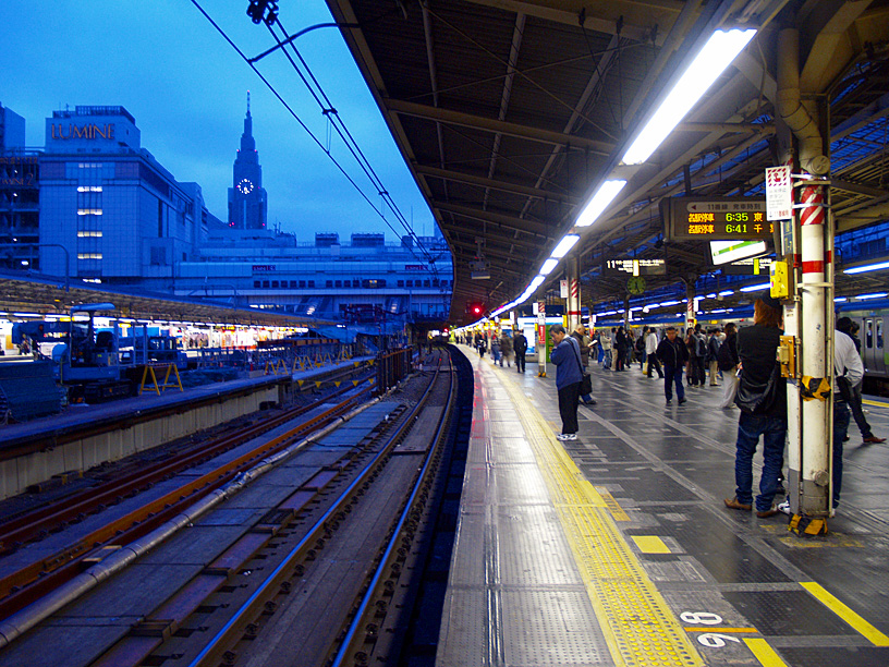 SHINJUKU